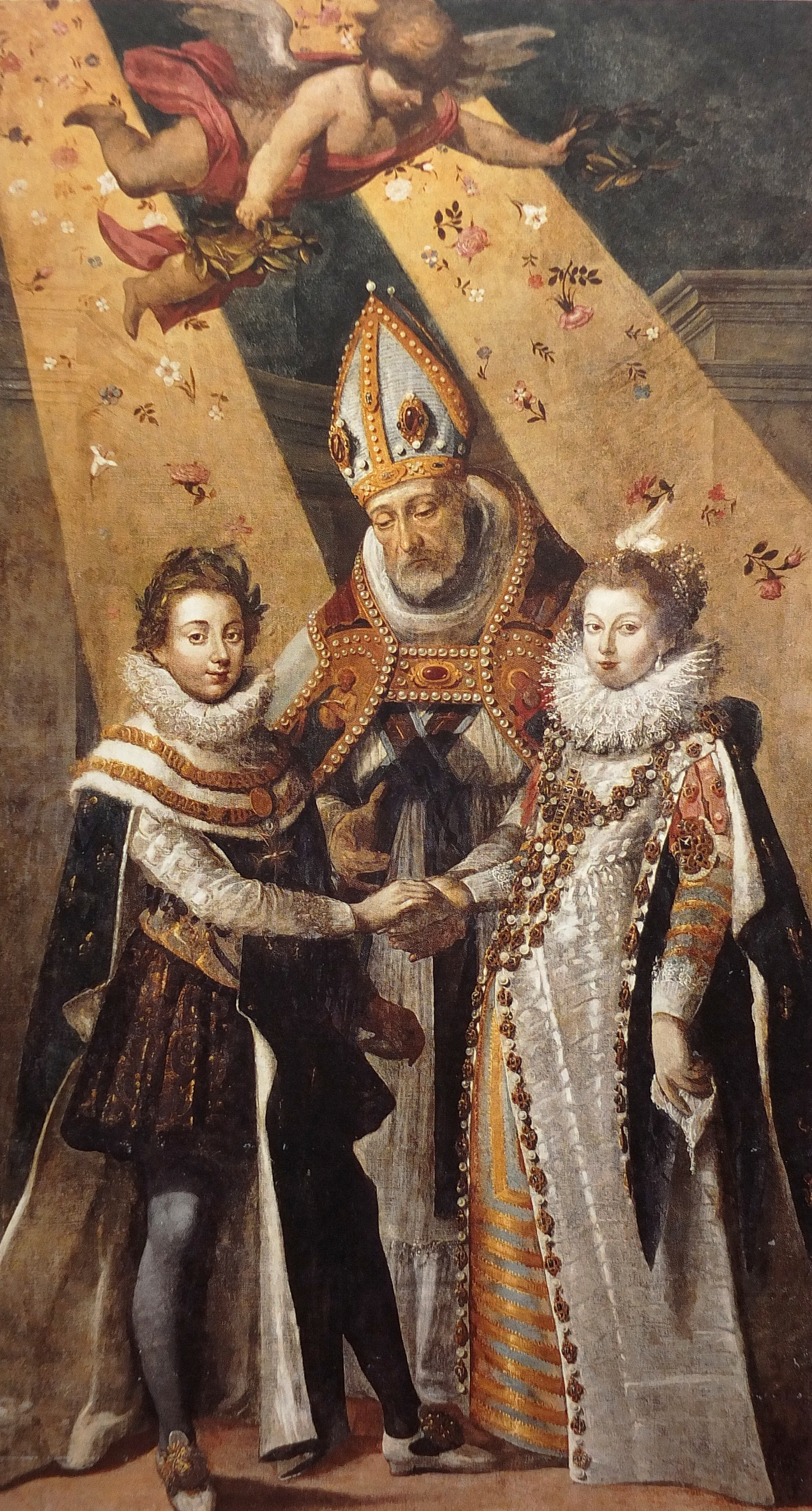 Le Mariage de Louis XIII, Roi de France et de Navarre, et d'Anne d'Autriche de Jean Chalette (1581-1644), commandée par les Capitouls de 1614-1615, huile sur toile de 2,49m par 1,38m - Musée des Augustins à Toulouse. - Reproduit dans L'Or de Toulouse Fernand Cousteaux, éditions Locales de France / La Dépèche du Midi 1996) ISBN:2-911-065-02-6 - Photo de cette reproduction par Siren|Com.